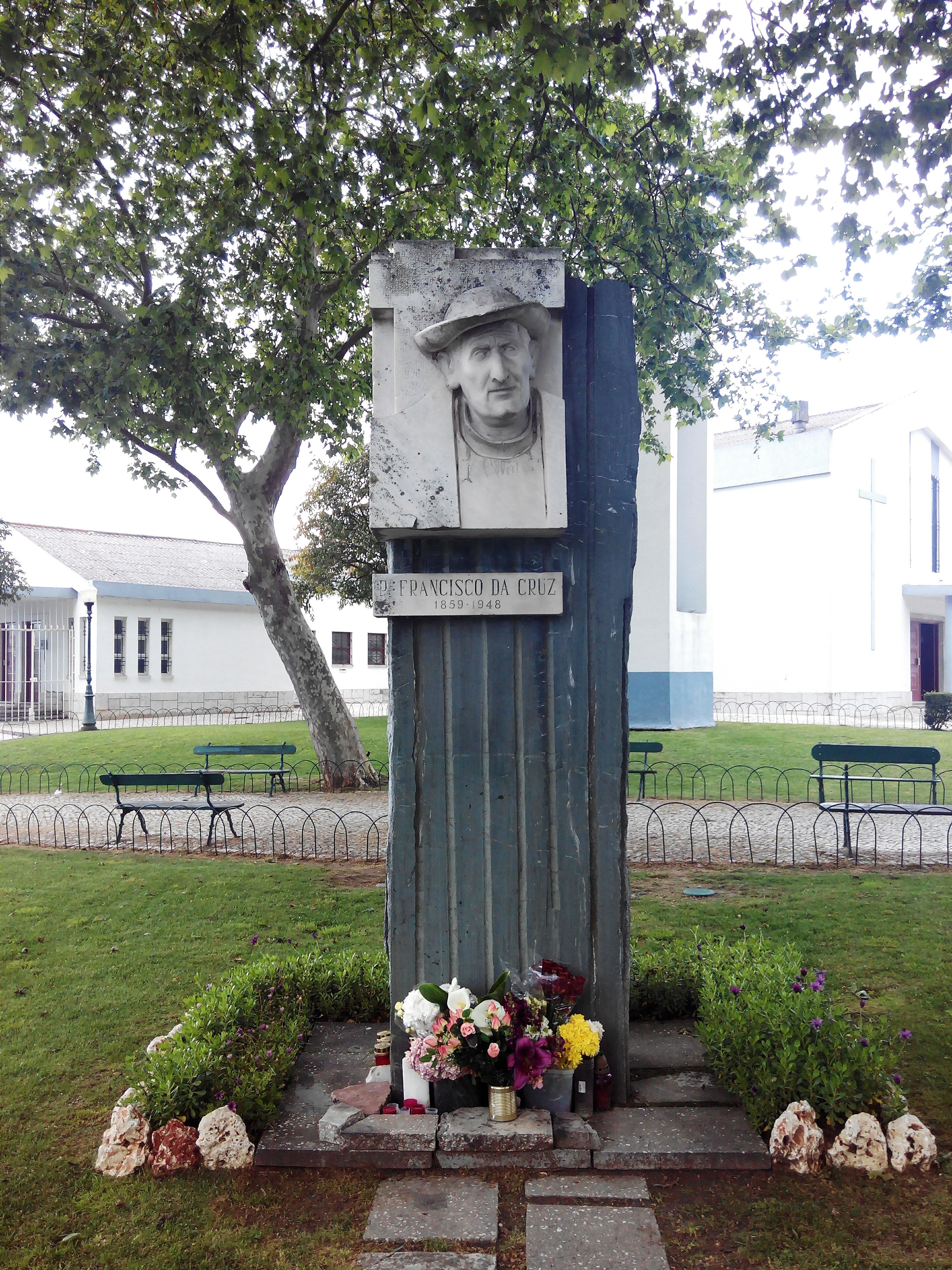 Estátua localizada nos terrenos da Igreja do Bairro Padre Cruz.